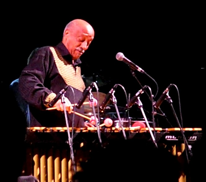 Mulatu Astatke auf dem Festival Primavera Sound 2013 in Barcelona